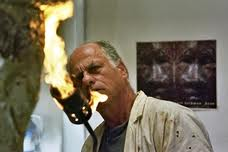 האמן צבי לחמן